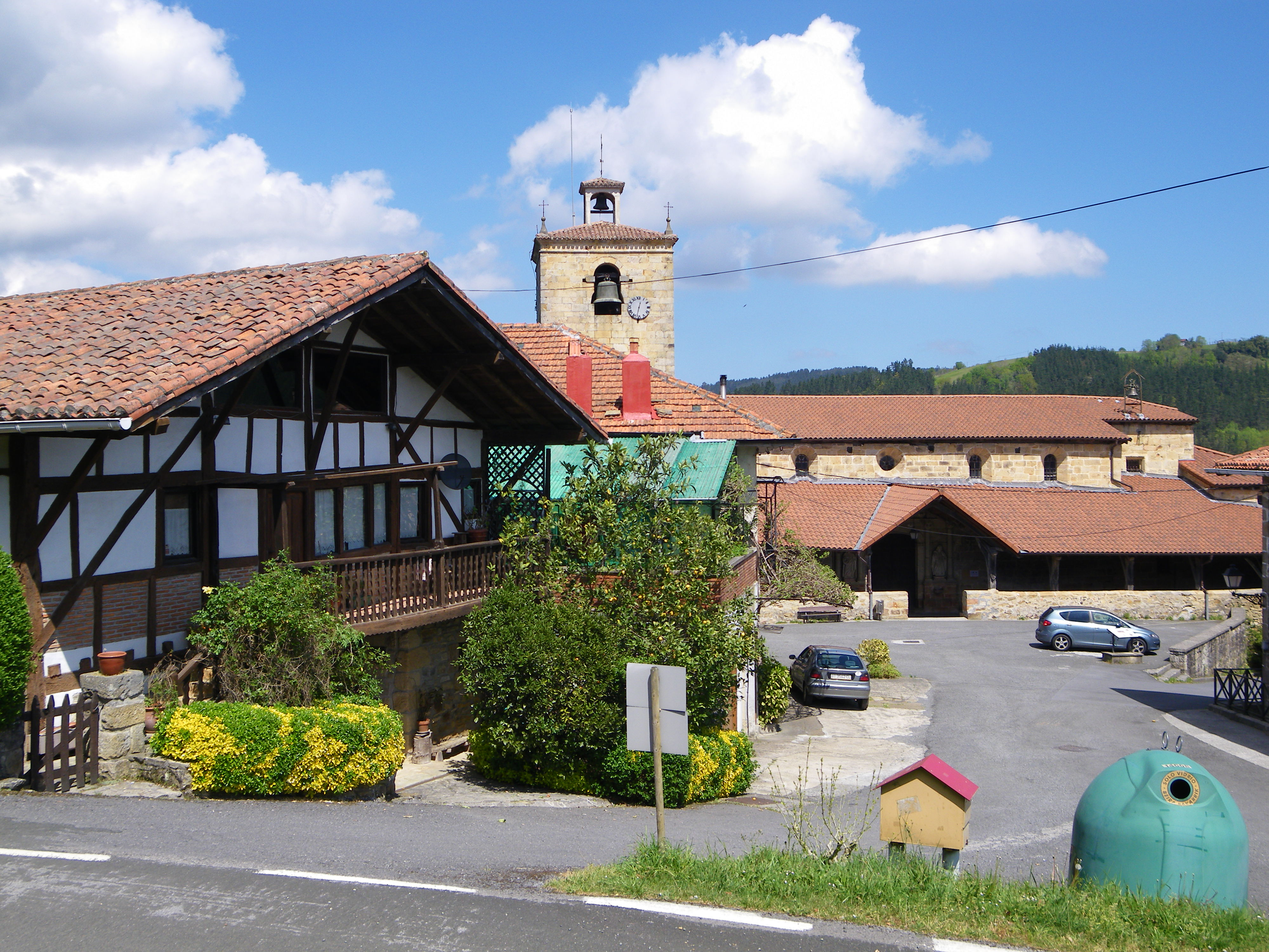 Meakaur, Morga, Bizkaia, Euskal Herria.